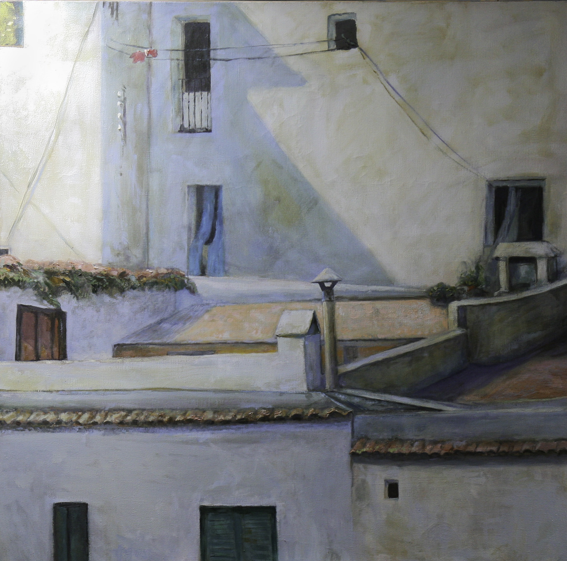 Ibiza